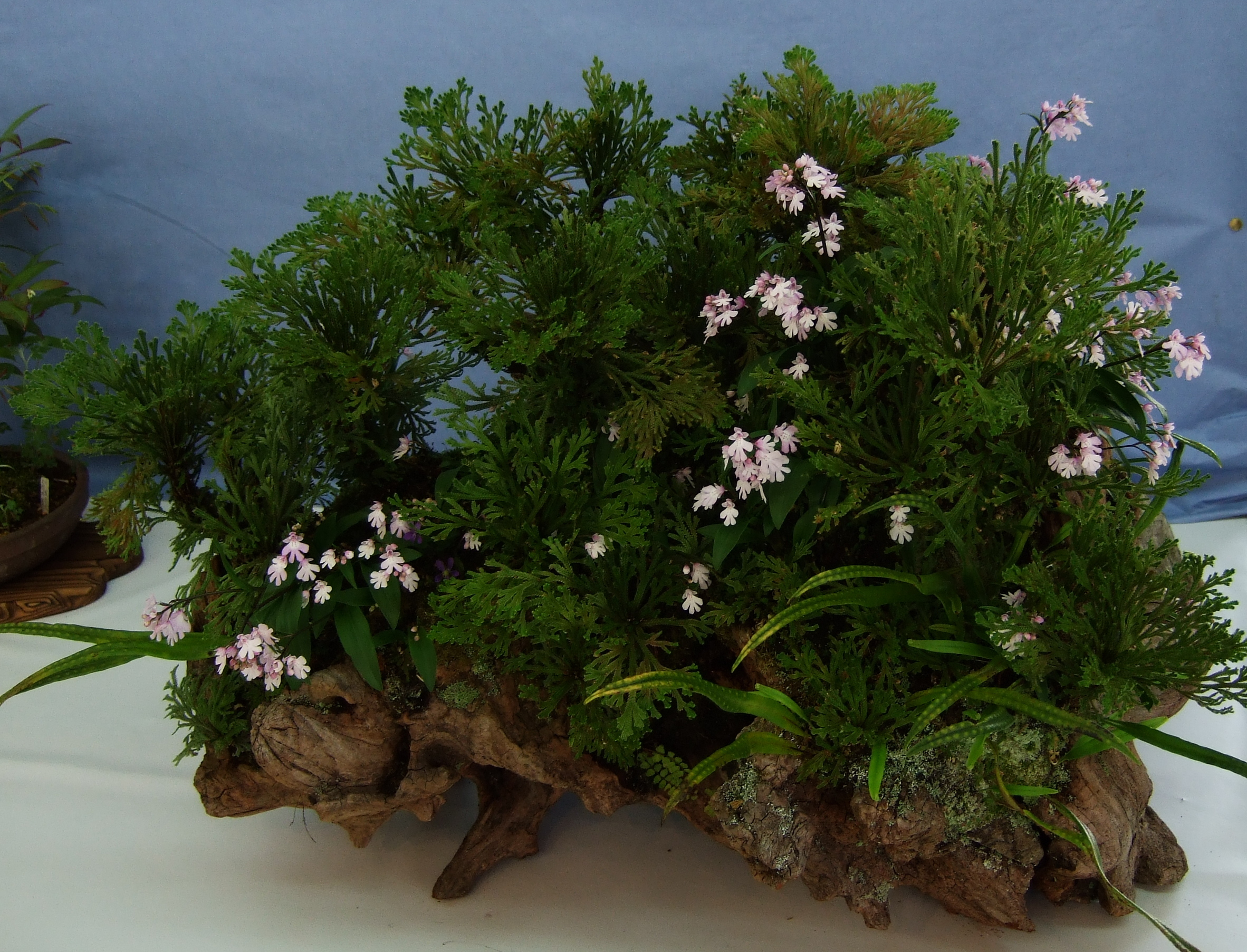 兵庫県立フラワーセンターイワチドリイワヒバ